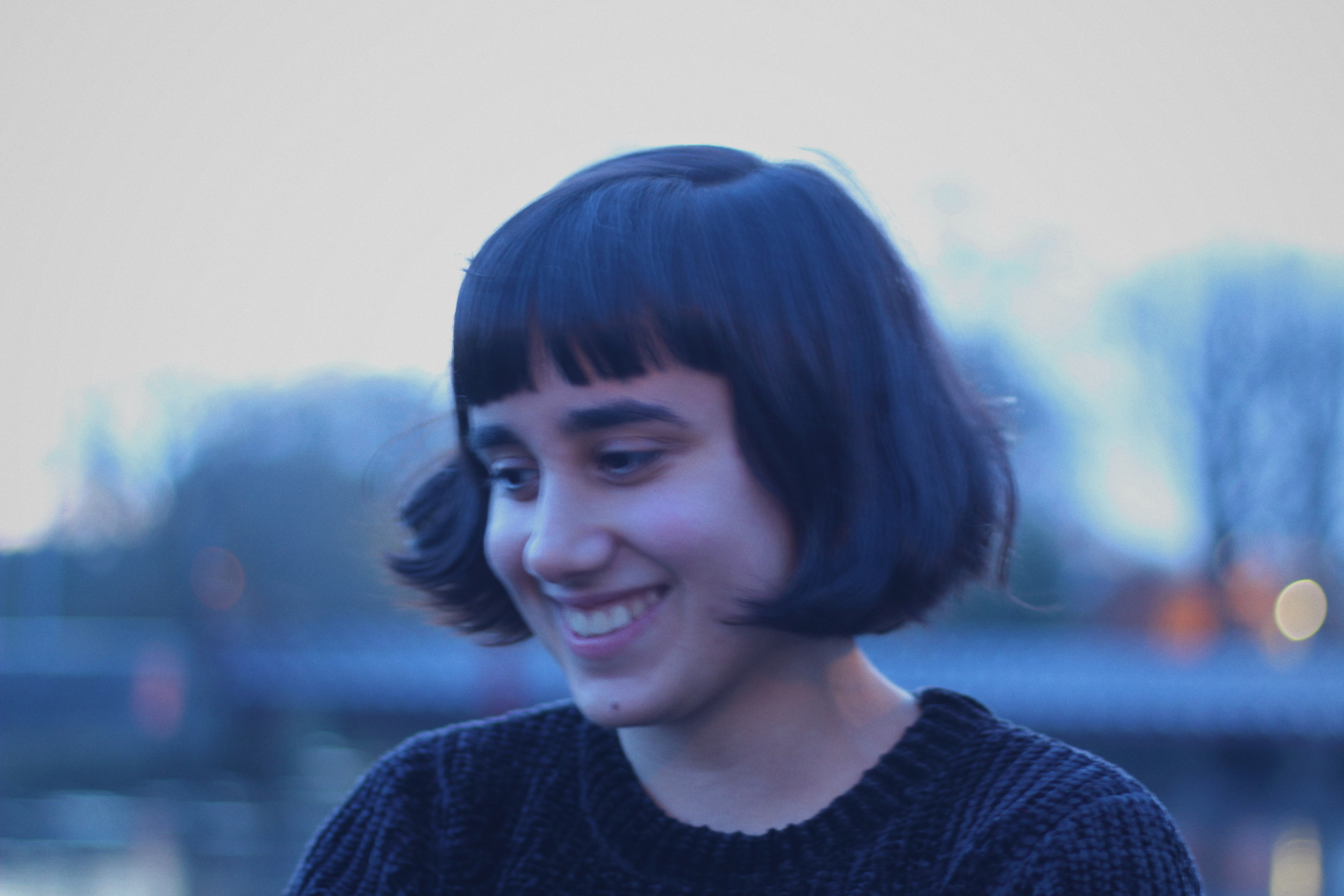 A poeta galega Regina Touceda.